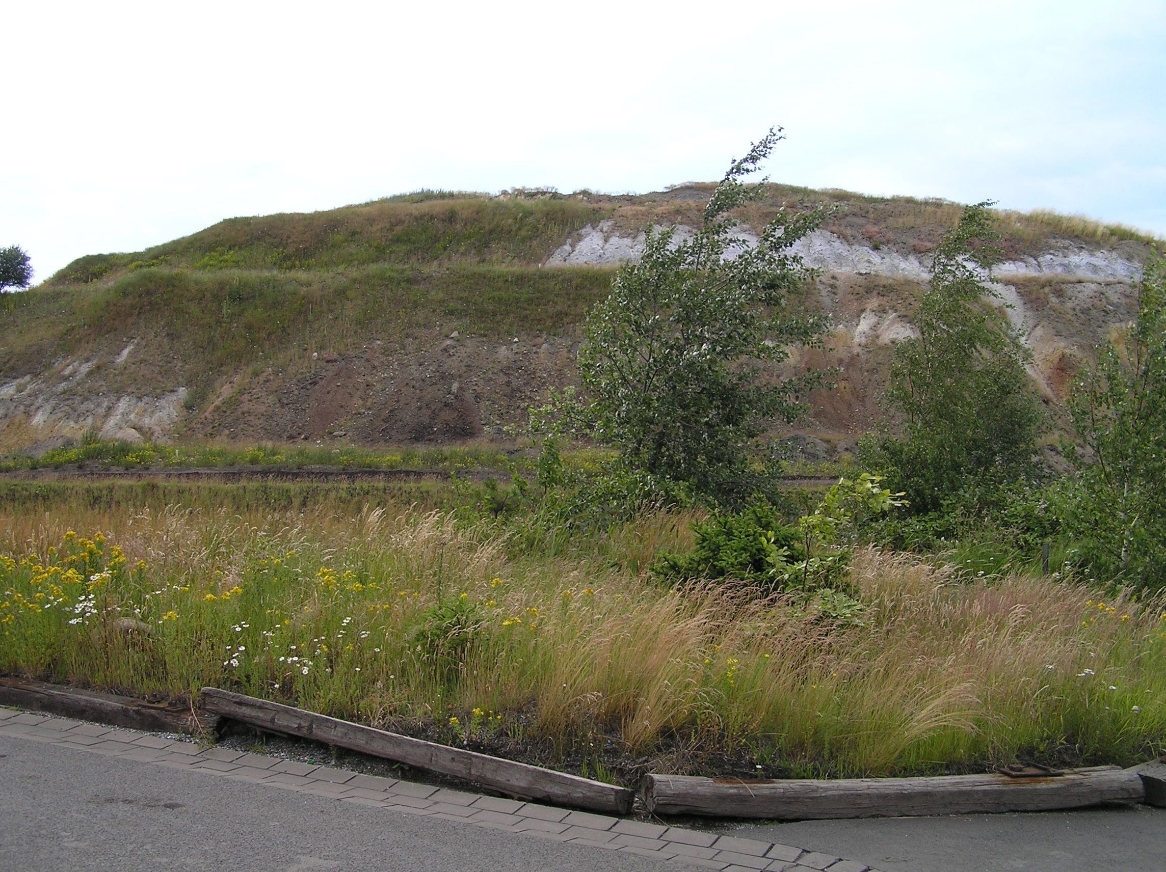 Die sogenannte Brandhalde (Pape-Schlacken), Rückstände der Pape-Anlage 1909 bis 1945; Goslar